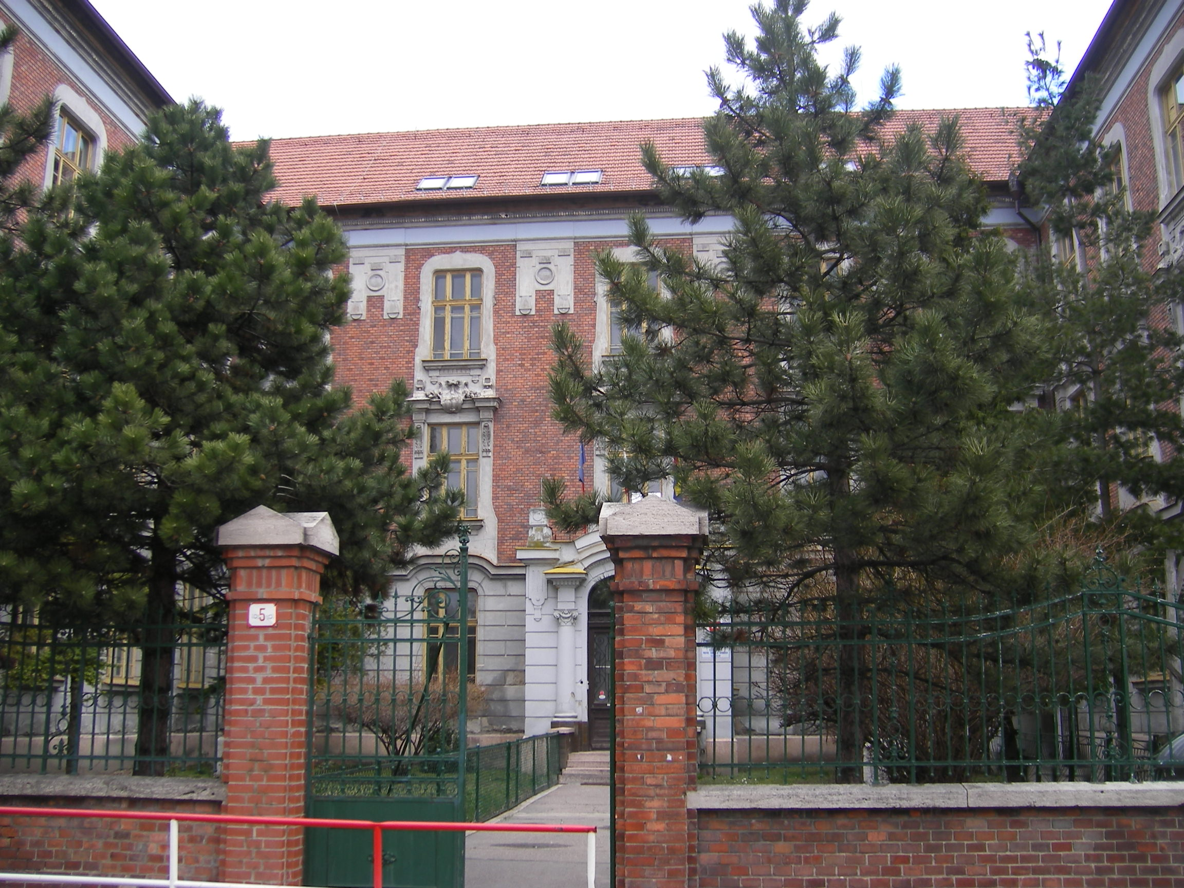 A komáromi Selye János Gimnázium